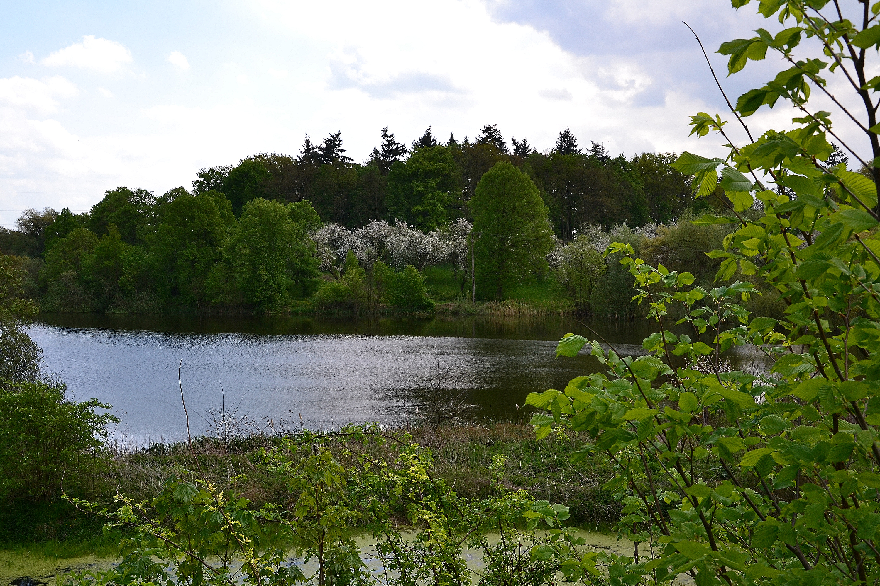 Narost, park pałacowy, XVIII/XIX